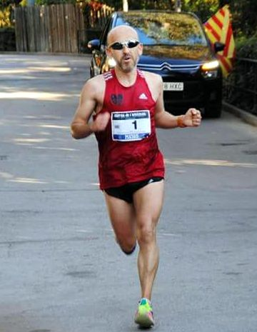 Andrés Acuña en la mítica Cursa de l'Amistat